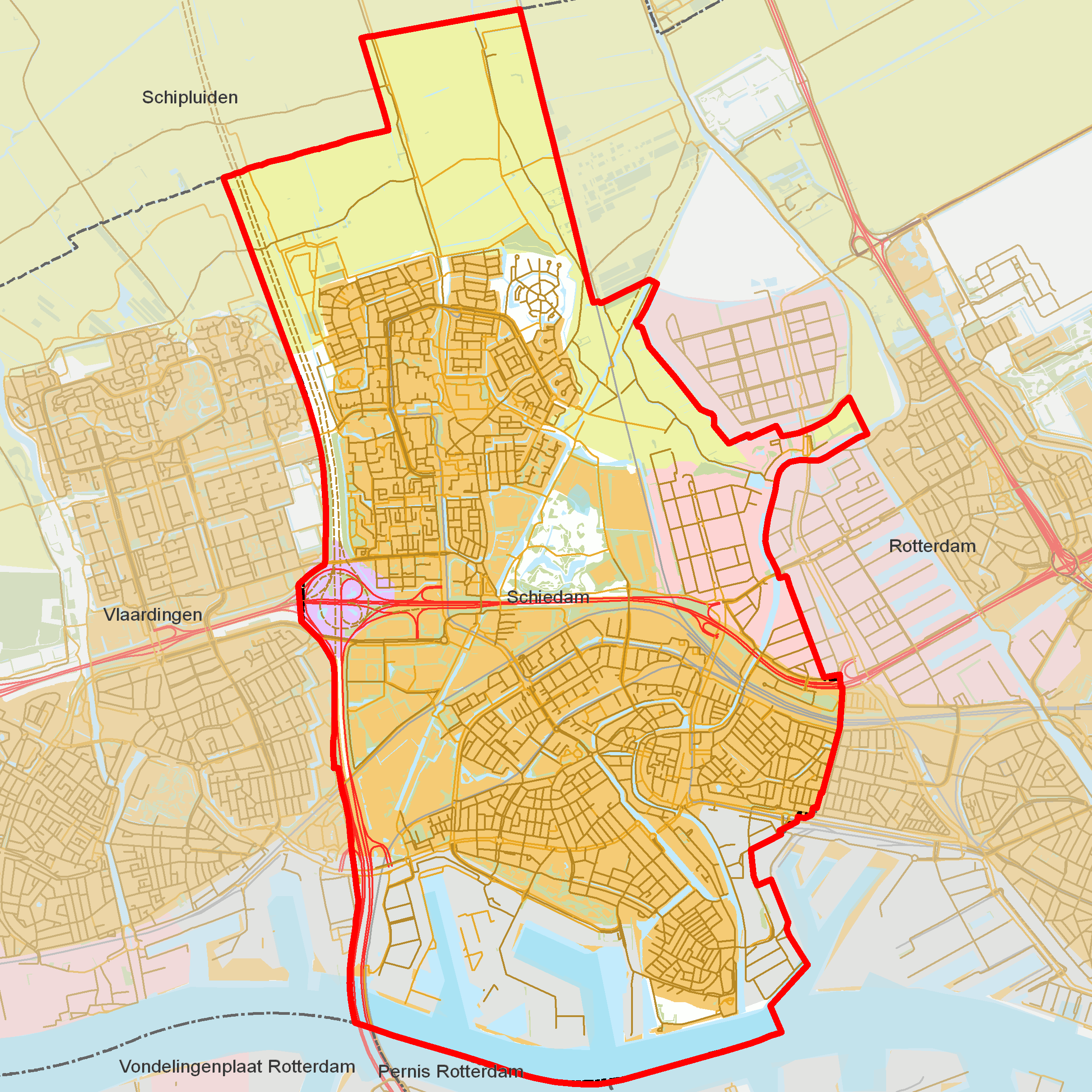 BAG woonplaatsen - Gemeente Schiedam.png